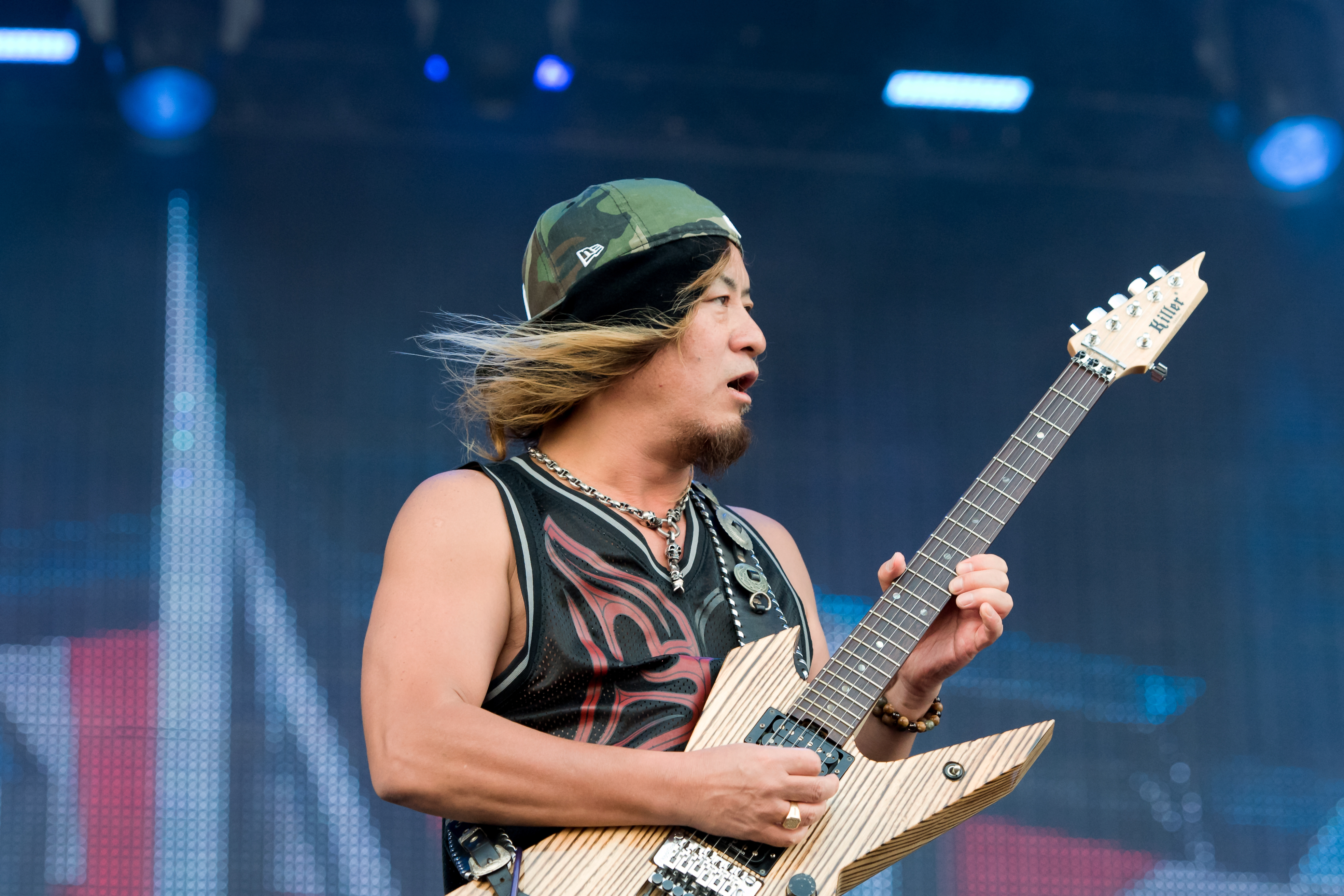 Loudness beim Wacken Open Air 2016